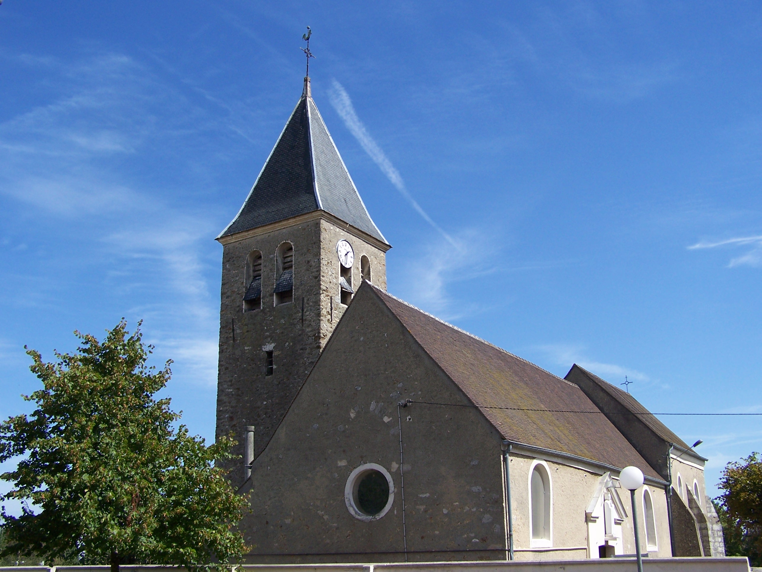 Église des Clayes-sous-Bois (Yvelines, France). Photo personnelle. Church of Les Clayes-sous-Bois (Yvelines, France). Personal photo. Auteur/Author : ℍenry Salomé